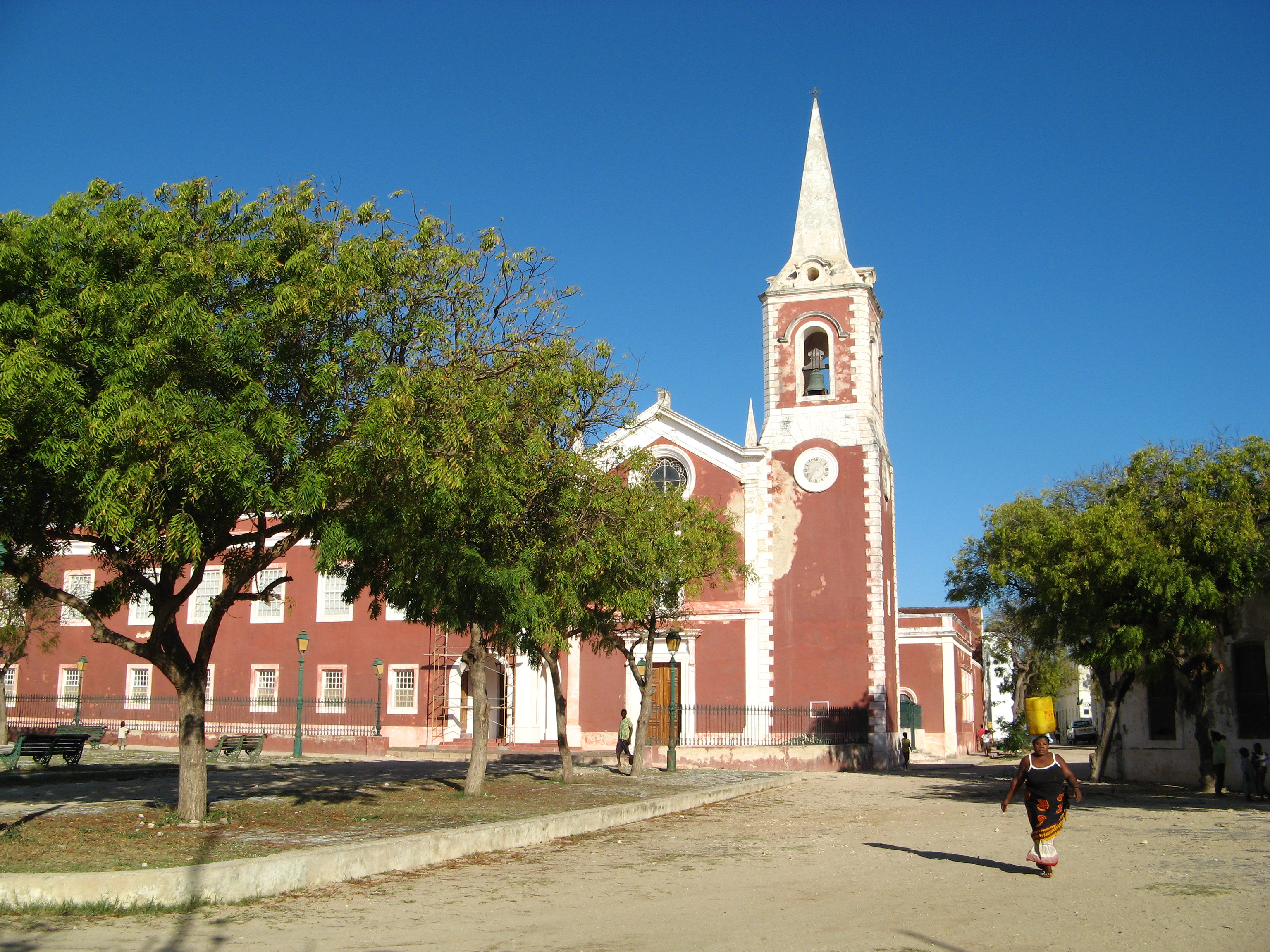 Ilha de Moçambique [2009]